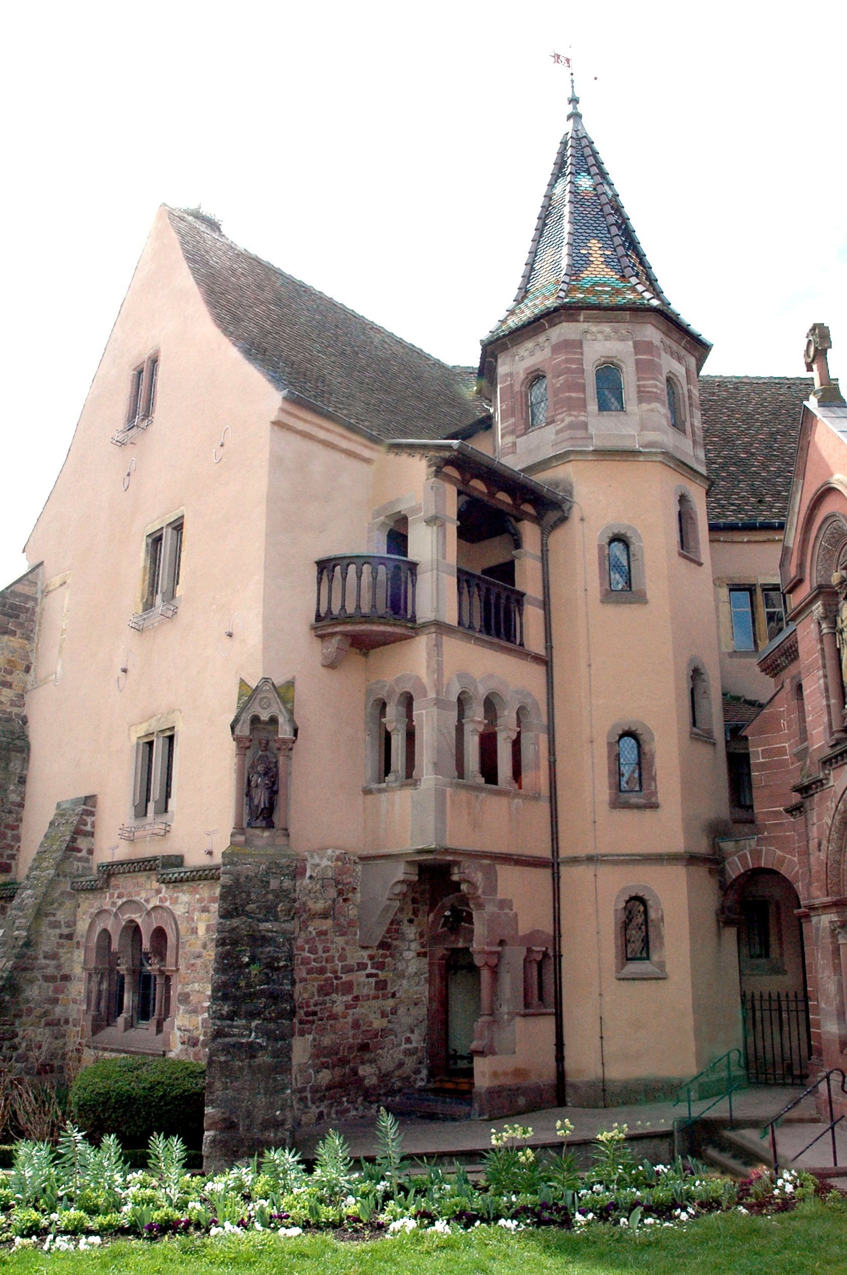 A 174